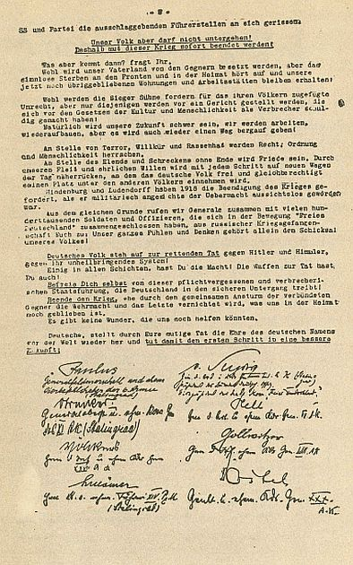 Aufruf der 50. Generale an Volk und Wehrmacht